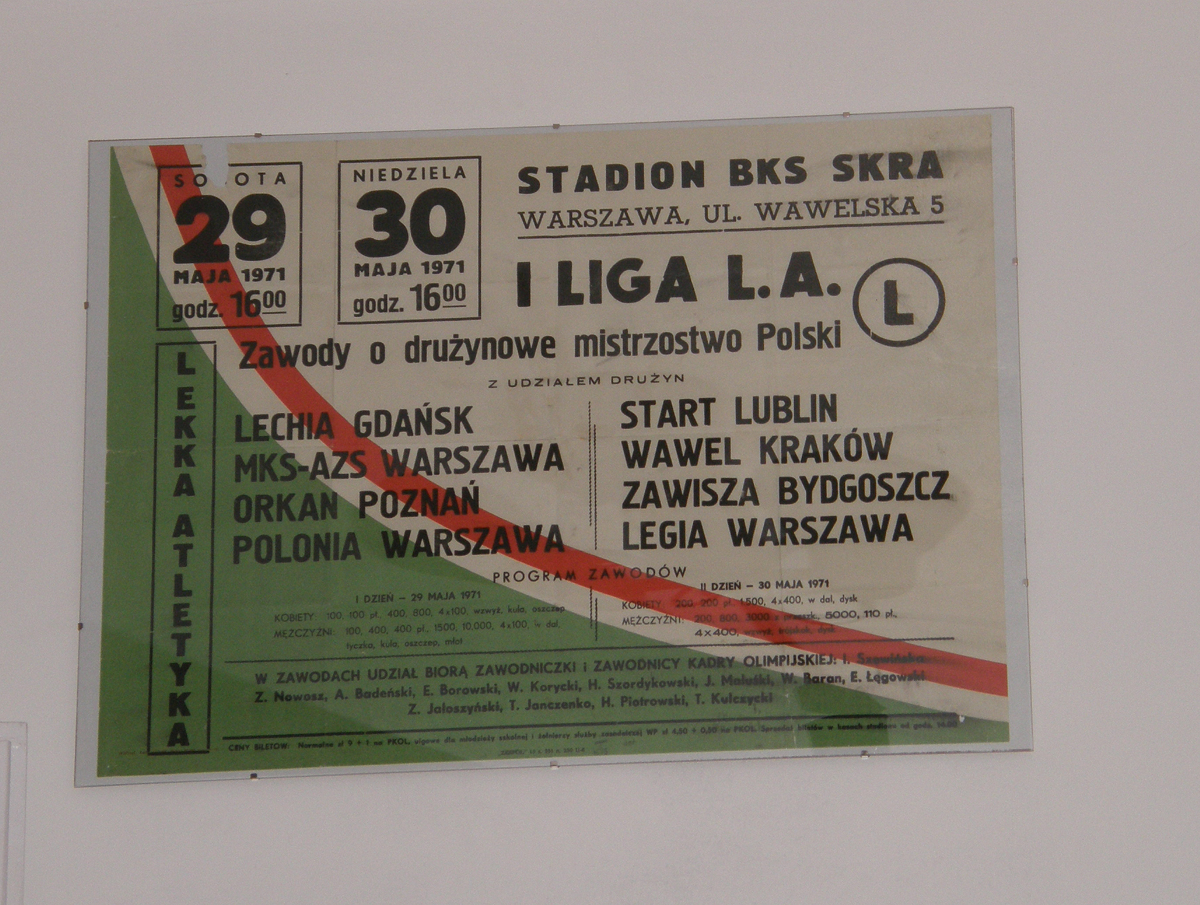 Zdjęcie przedstawia plakat reklamujący zawody I Ligi Lekkoatletycznej w roku 1971.